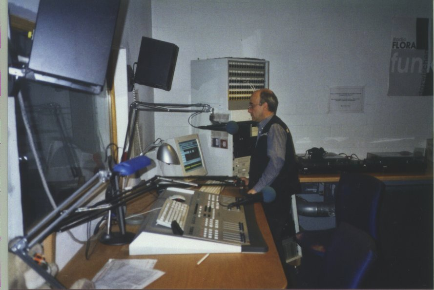 Radio flora-03